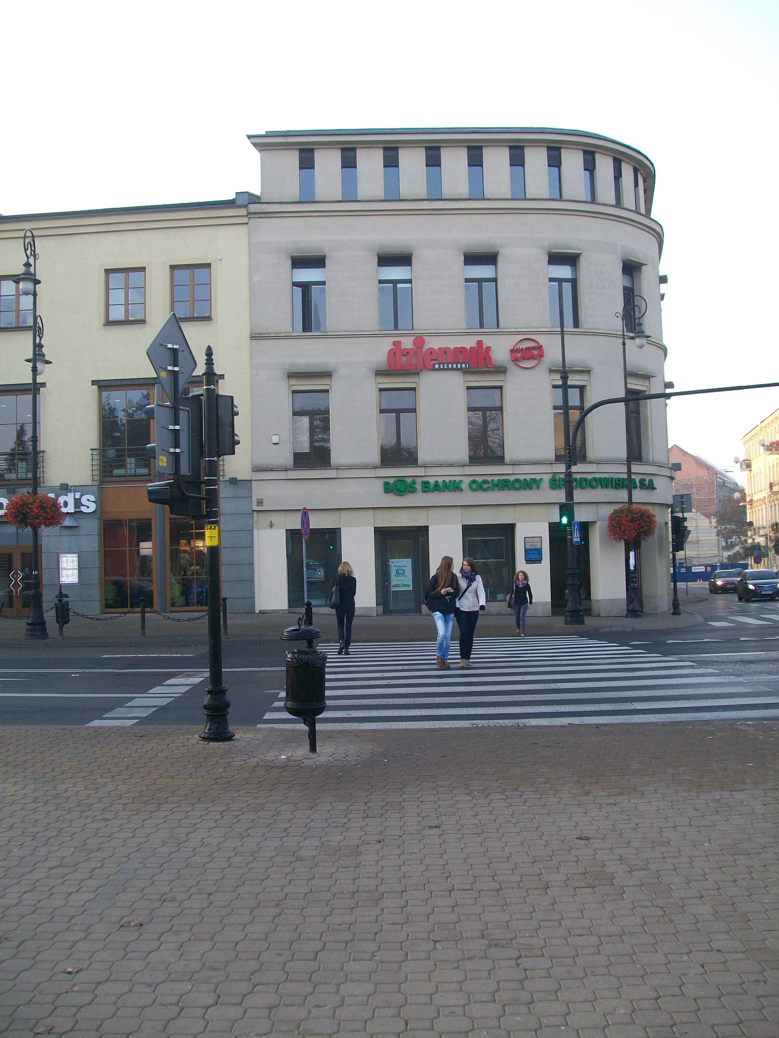 Siedziba Dziennika Wschodniego w Lublinie przy ul. Krakowskie Przedmieście.